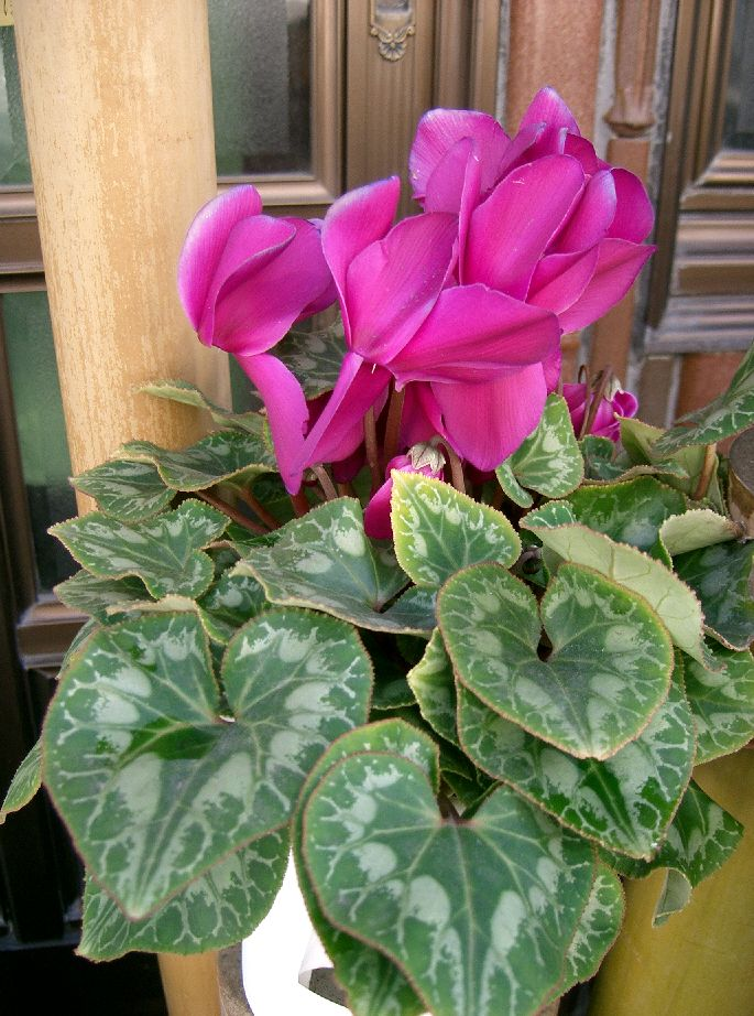 Cyclamen